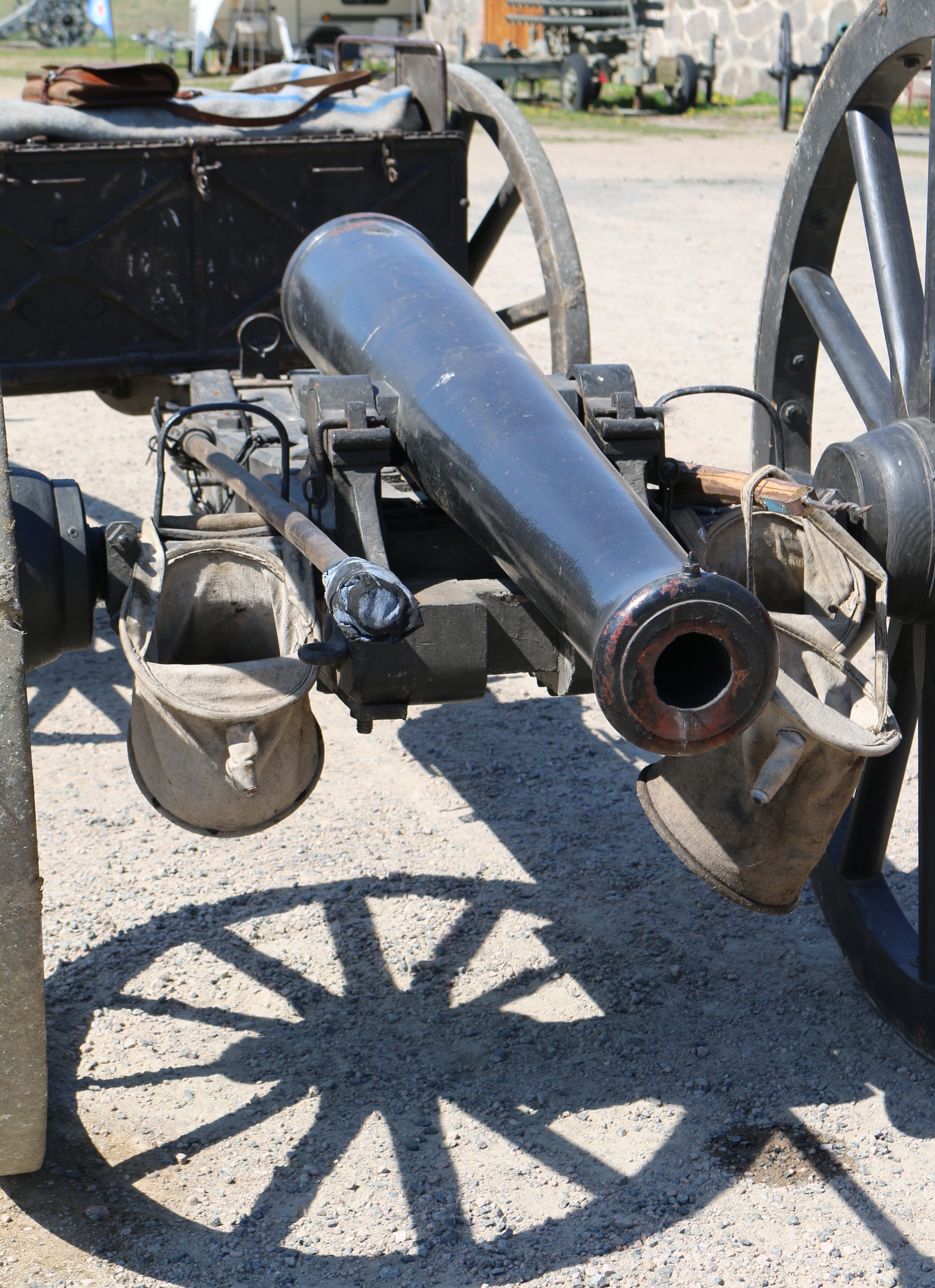 Kanon M 1863 Artillerimuseet 2017